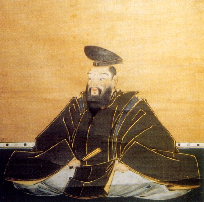 津軽為信 Tugaru Tamenobu.